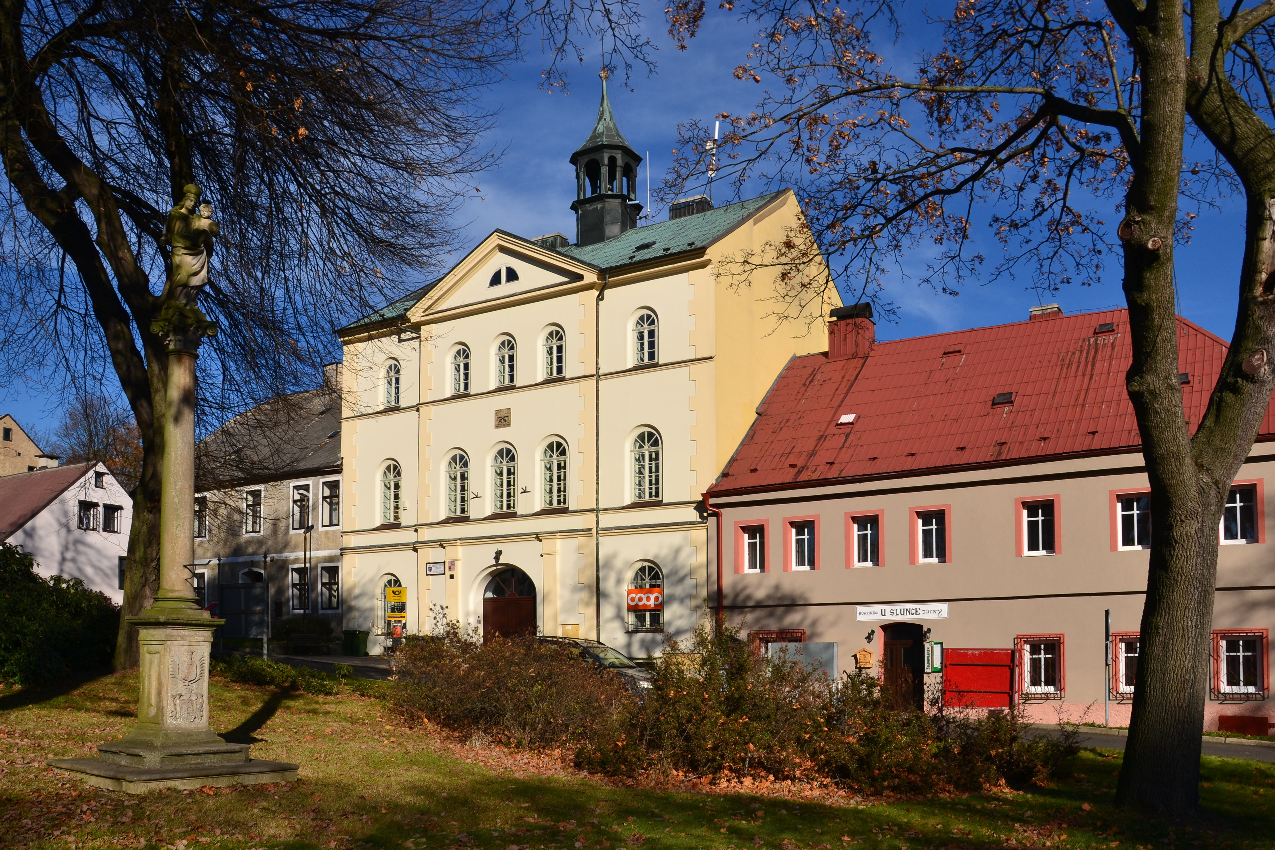 Radnice, Výsluní 14, Výsluní.